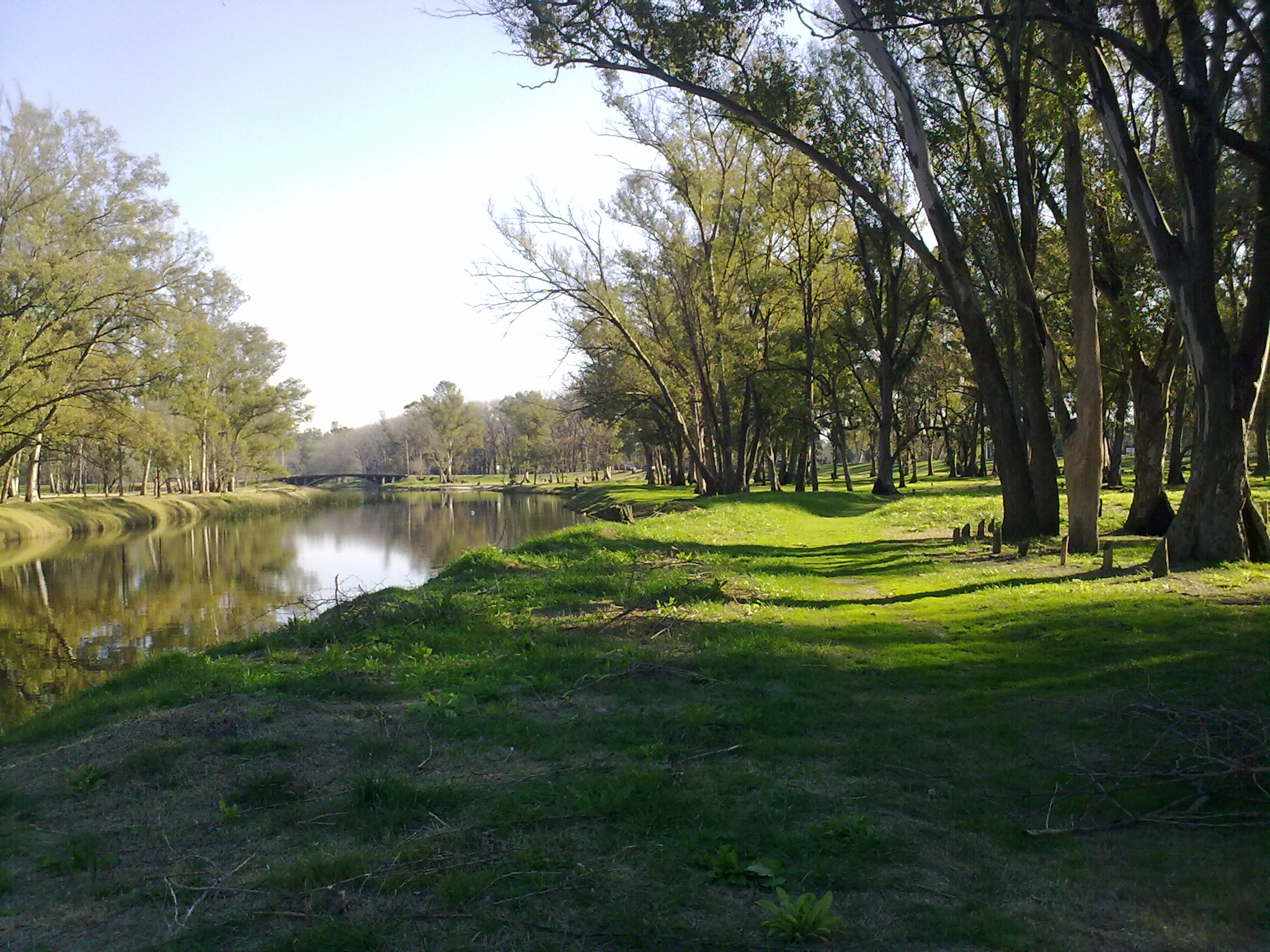 foto en los bosques de ezeiza con vista al rio matanza